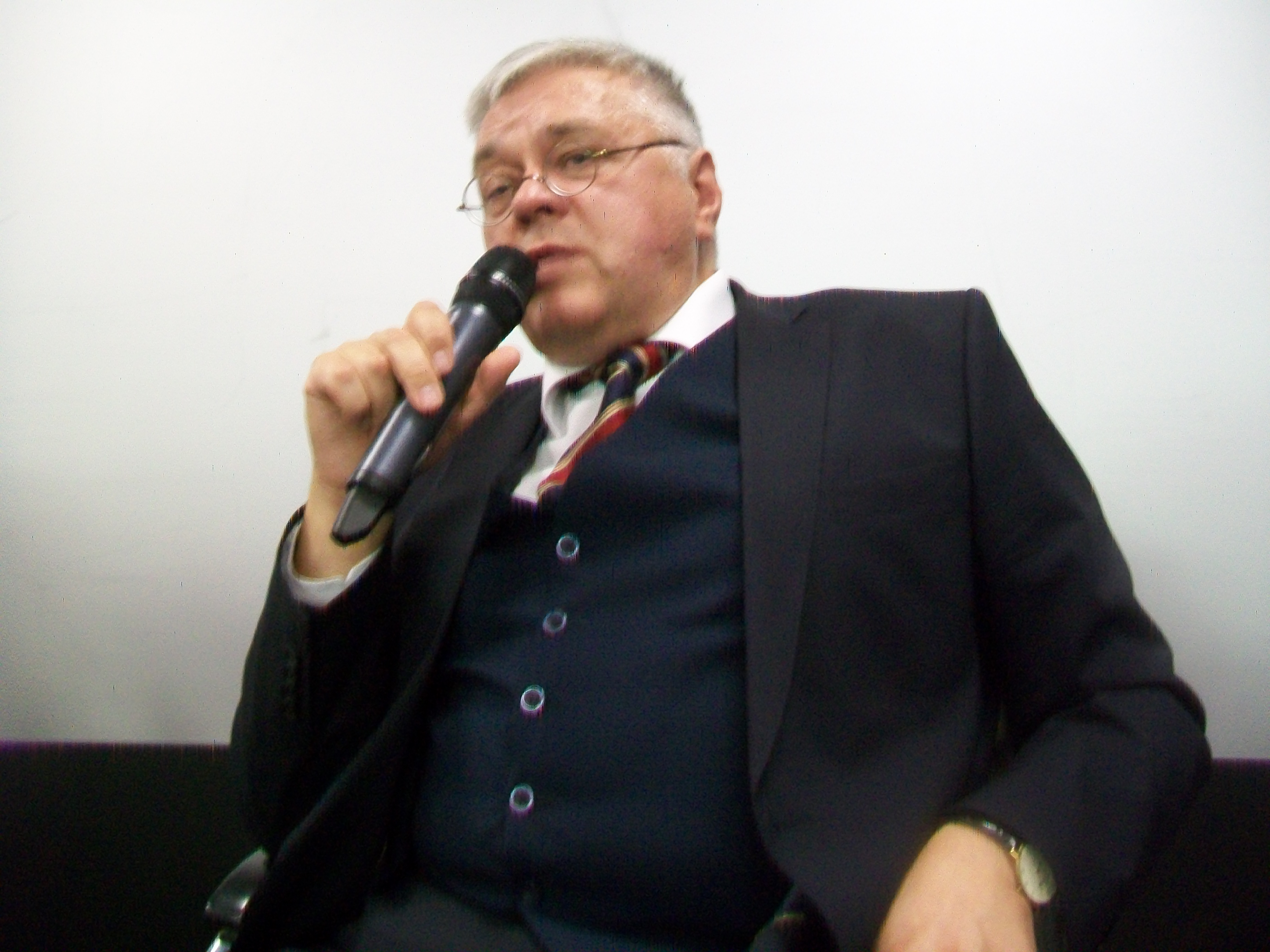 Валерий Николаевич Гарбузов, директор Института США и Канады РАН во время "диалога" с Выжутовичем в Ельцин-центре. Екатеринбург, 22 июня 2017 года